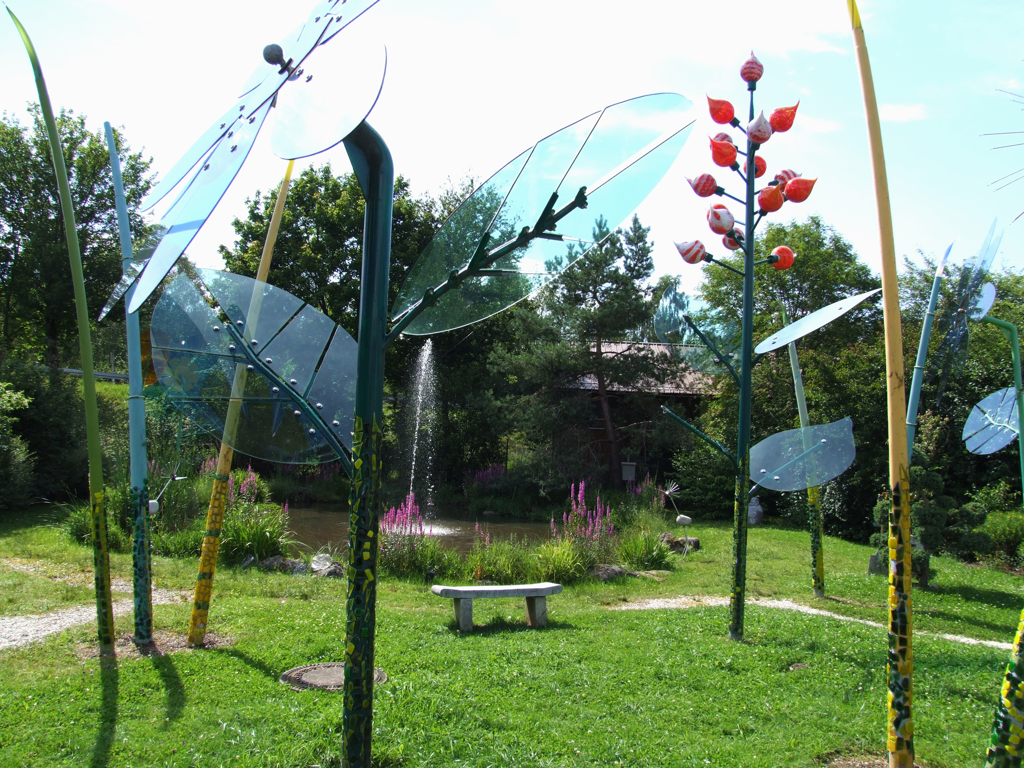 Glasgarten - JOSKA Glasparadies, Bodenmais